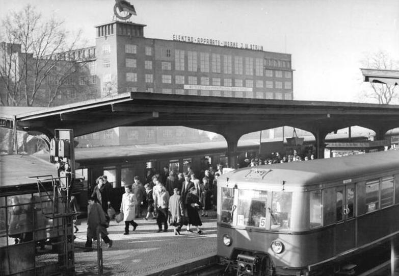 Zentralbild-Junge 14.11.1958 Blick auf den S-Bahnhof Treptower Park. Im Hintergrund das VEB Elektroapparatewerk Treptow